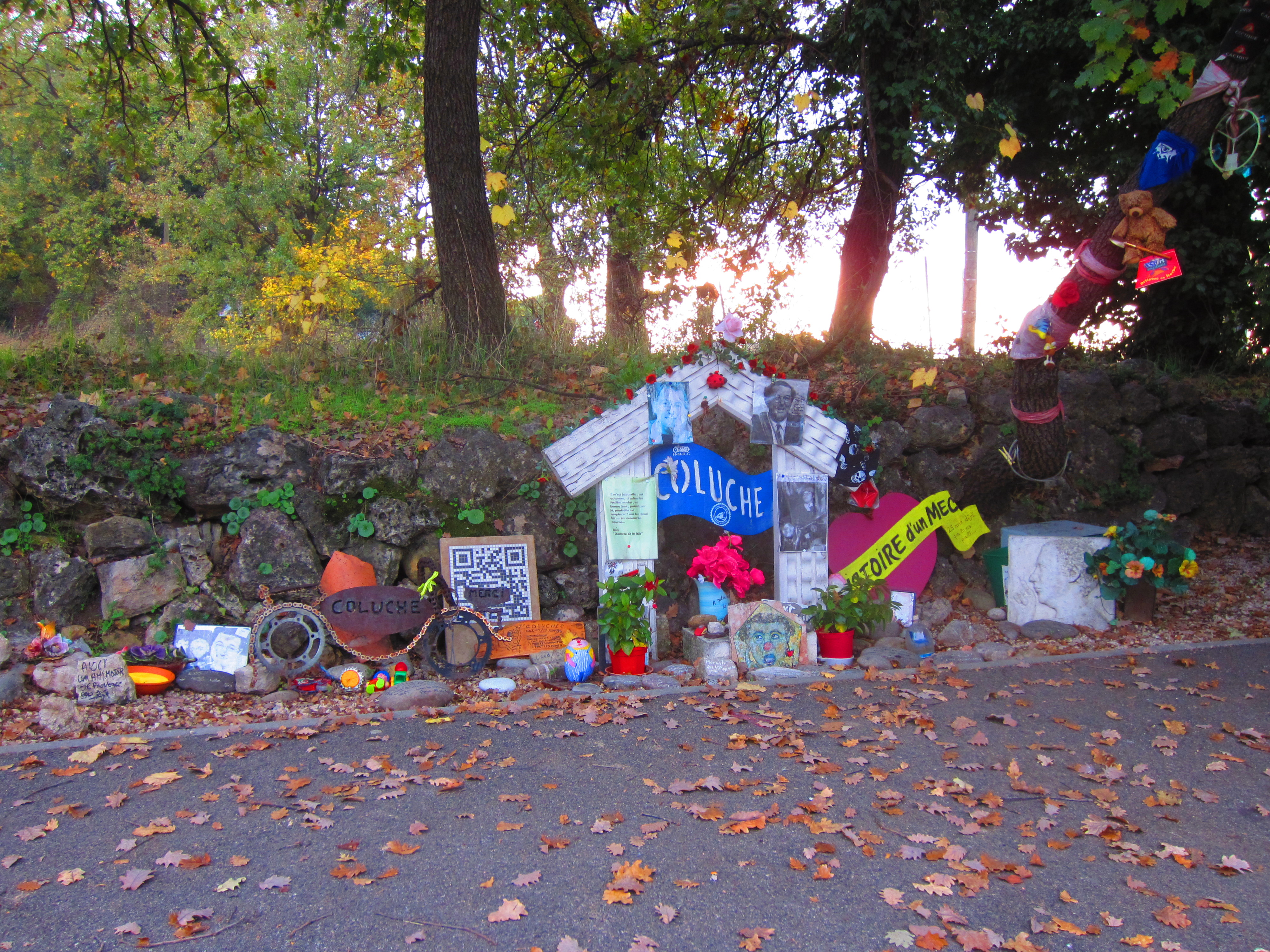 Hommages à Coluche à Opio, sud de la France.